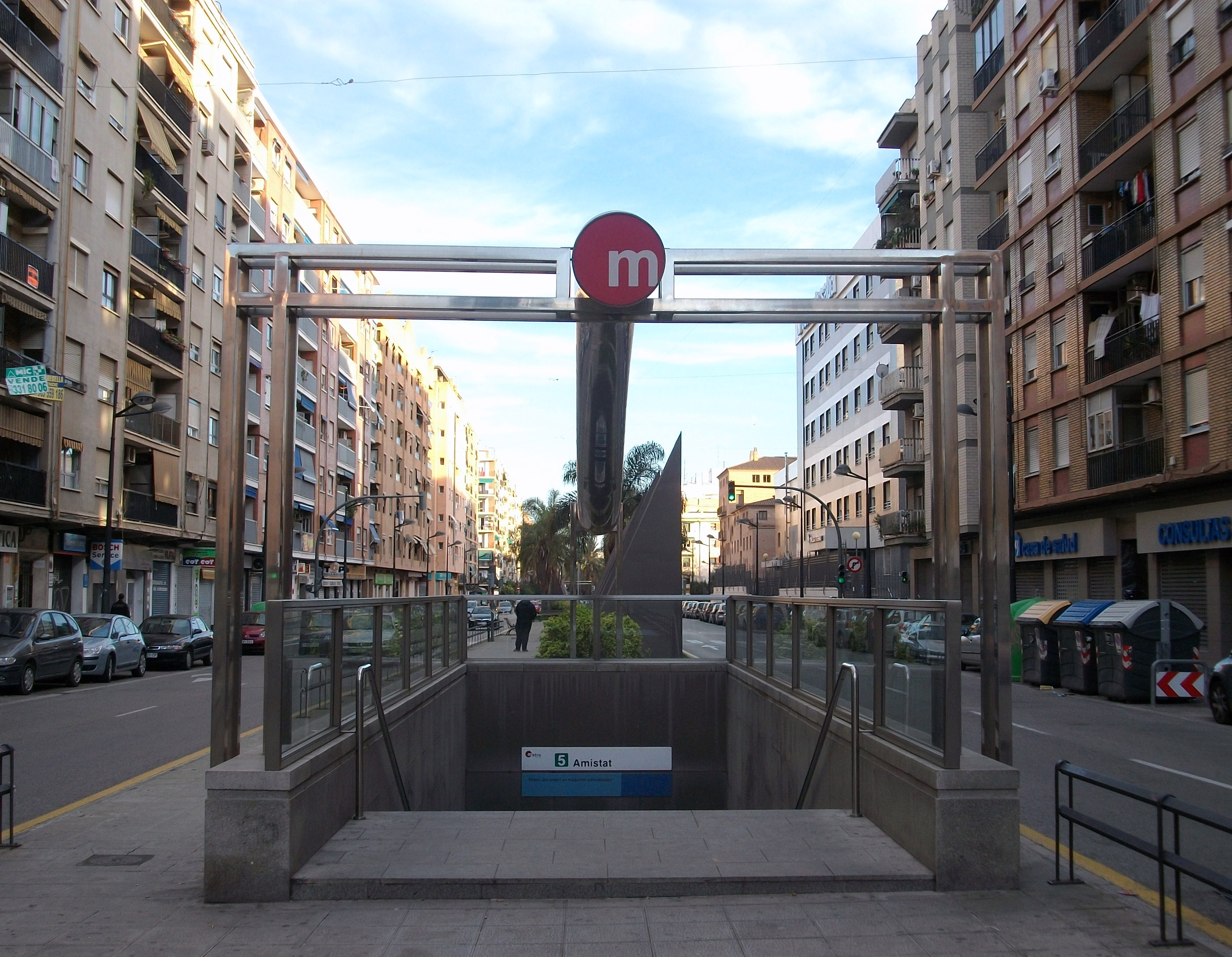 Accés a la parada de metro d'Amistat, València.